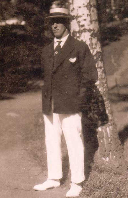 Bertil Carlsson